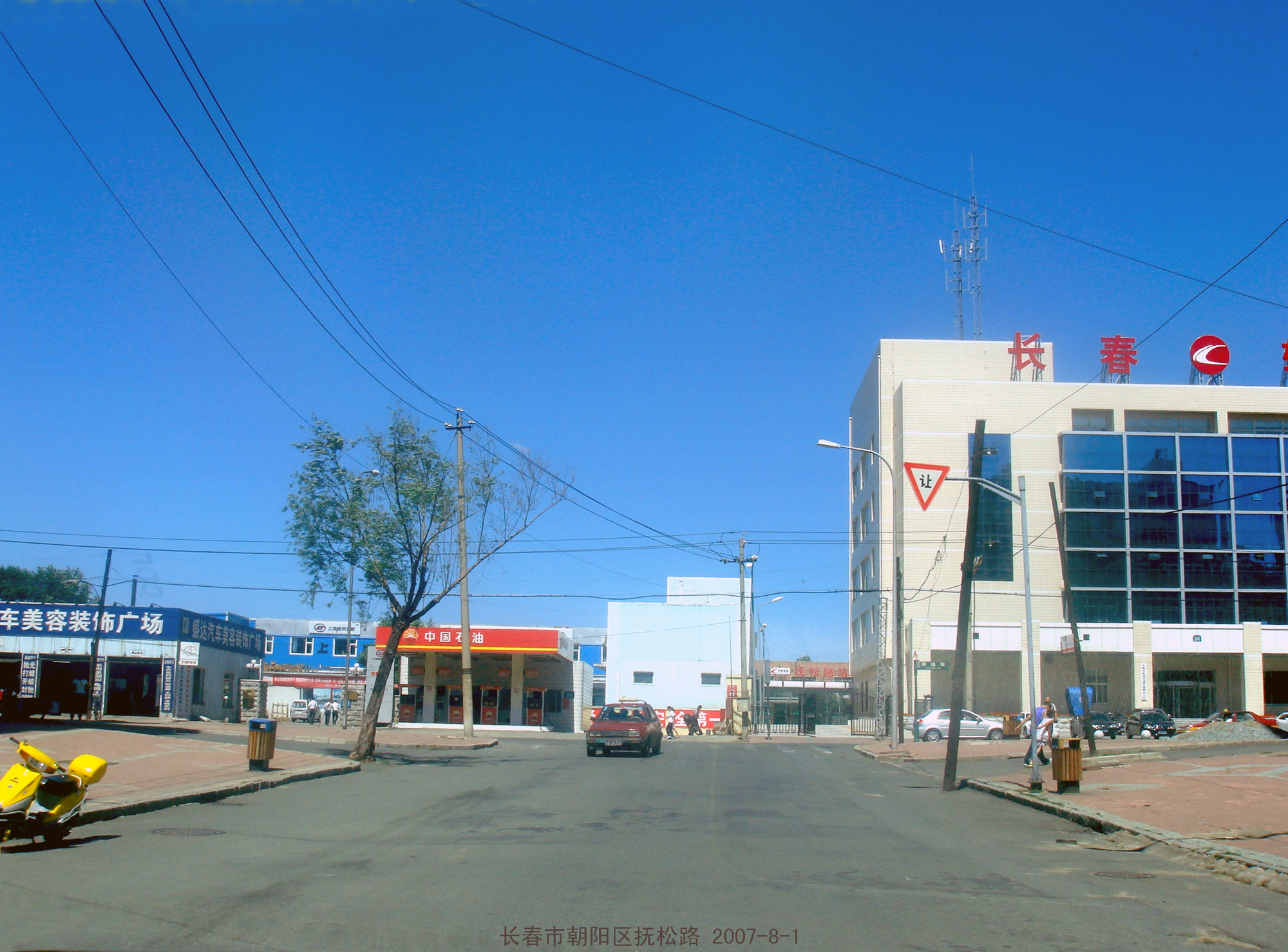 2007年长春市抚松路